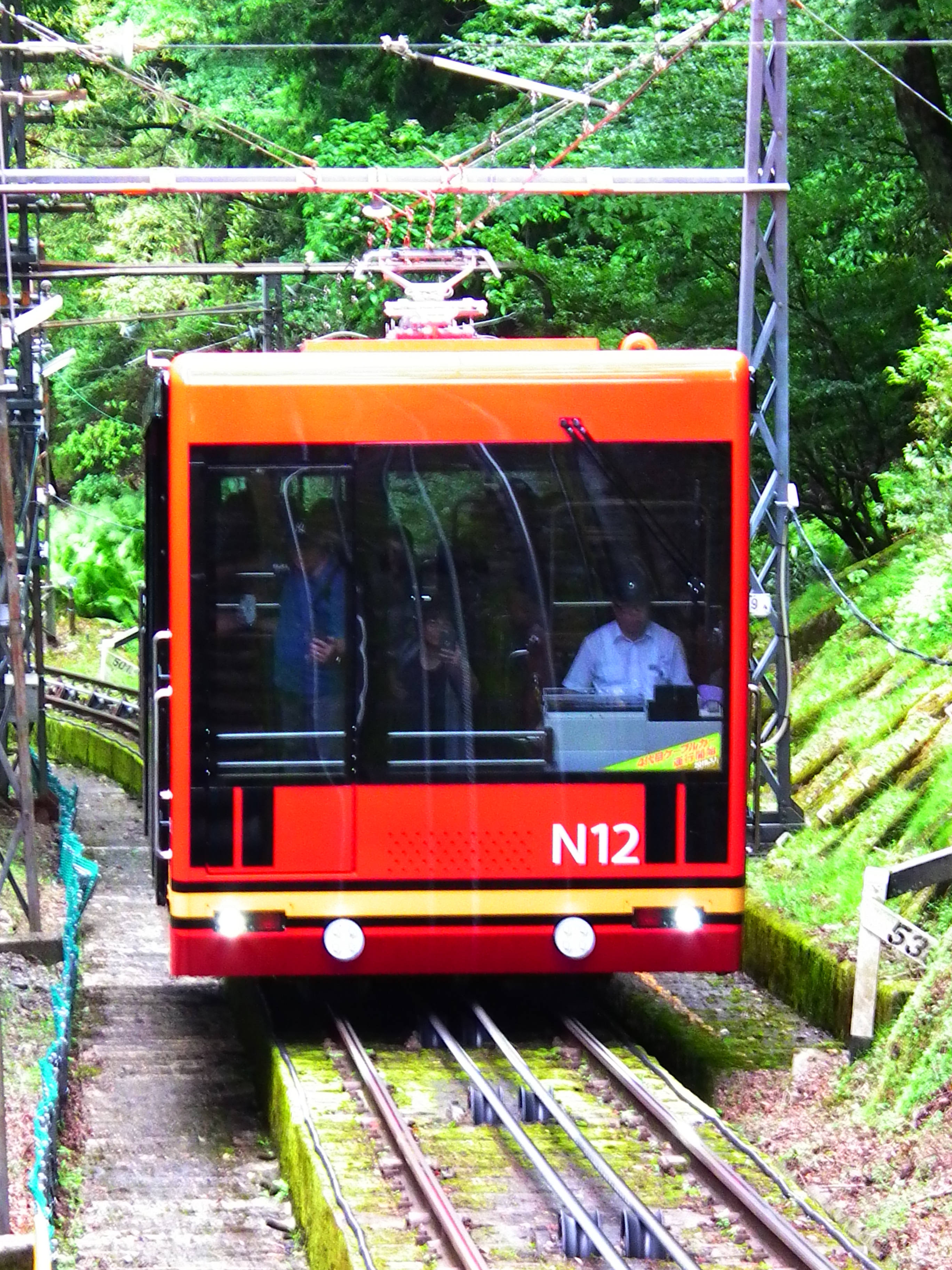 高野山駅に到着する４代目ケーブルカーN１２